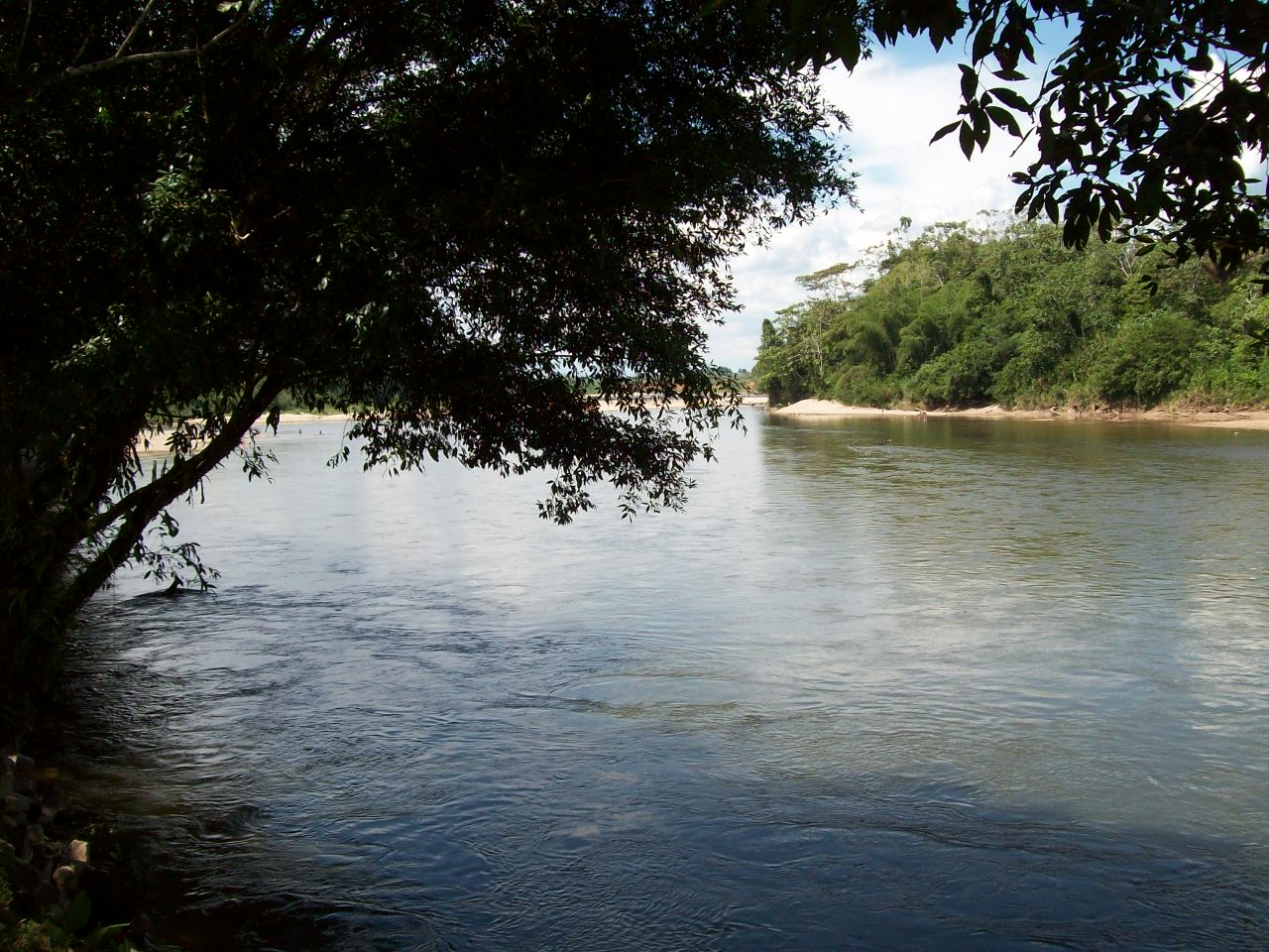 FOTOGRAFIA DEL RIO PUTUMAYO, EN EL CORREGIMIENTO DE SANTANA